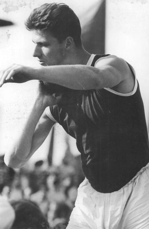 Fritz Kühl Zentralbild Wlocka-Wittig wen-L 20.07.1958 Deutsche Leichtathletikmeisterschaften vom 18.- 20.07.1958 in Jena. Fritz Kühl holte sich beim Kugelstoßen den Titel eines Deutschen Meisters.